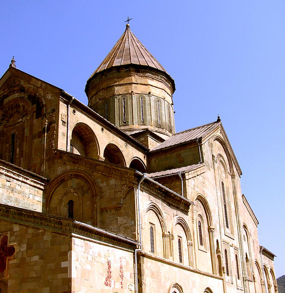 Mtskheta